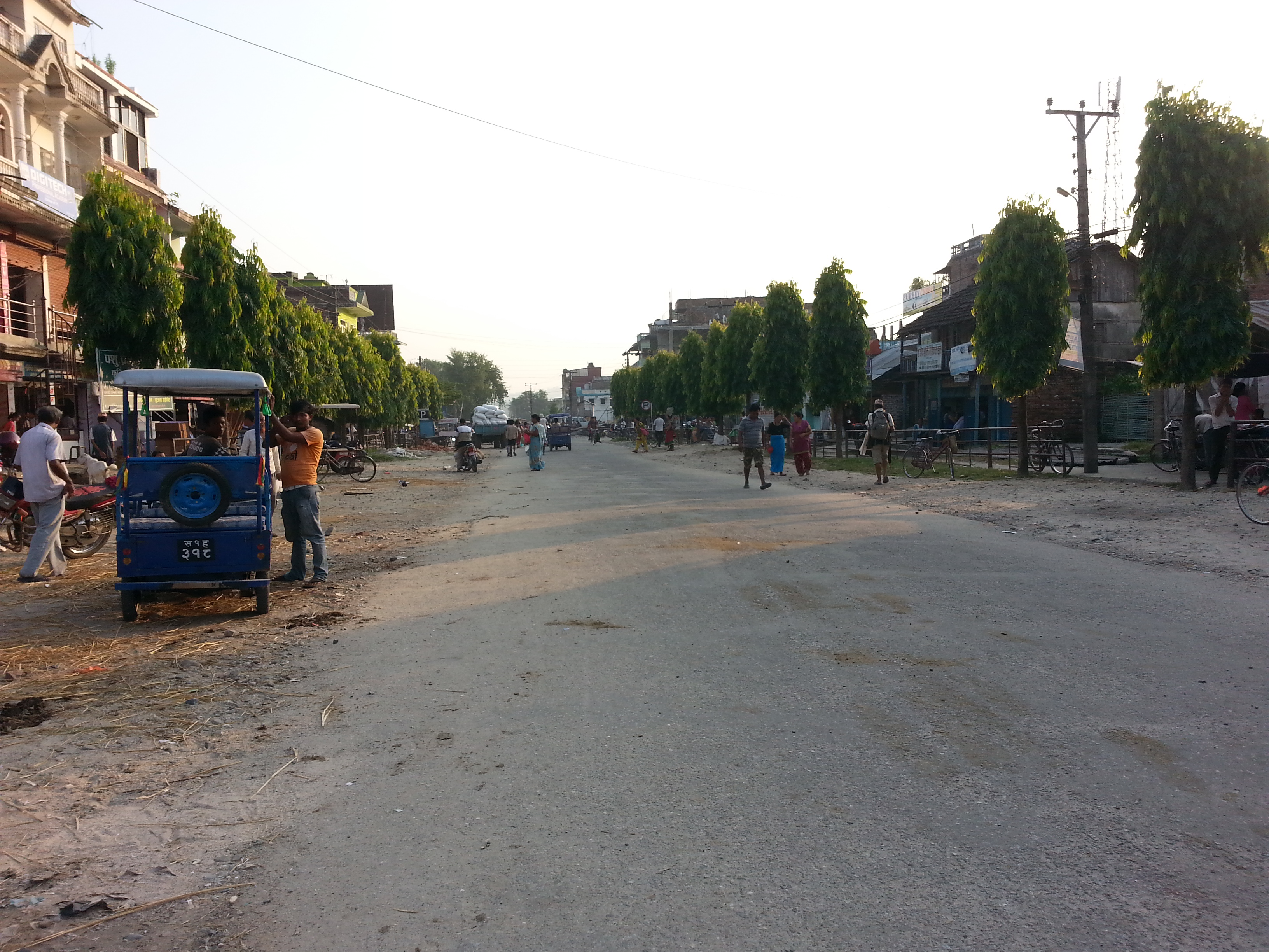 नेपाली: डि एम गेट नजिक, गाईघाट (त्रियुगा नगरपालिका)